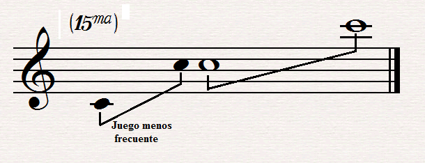 Tesitura de los crótalos.